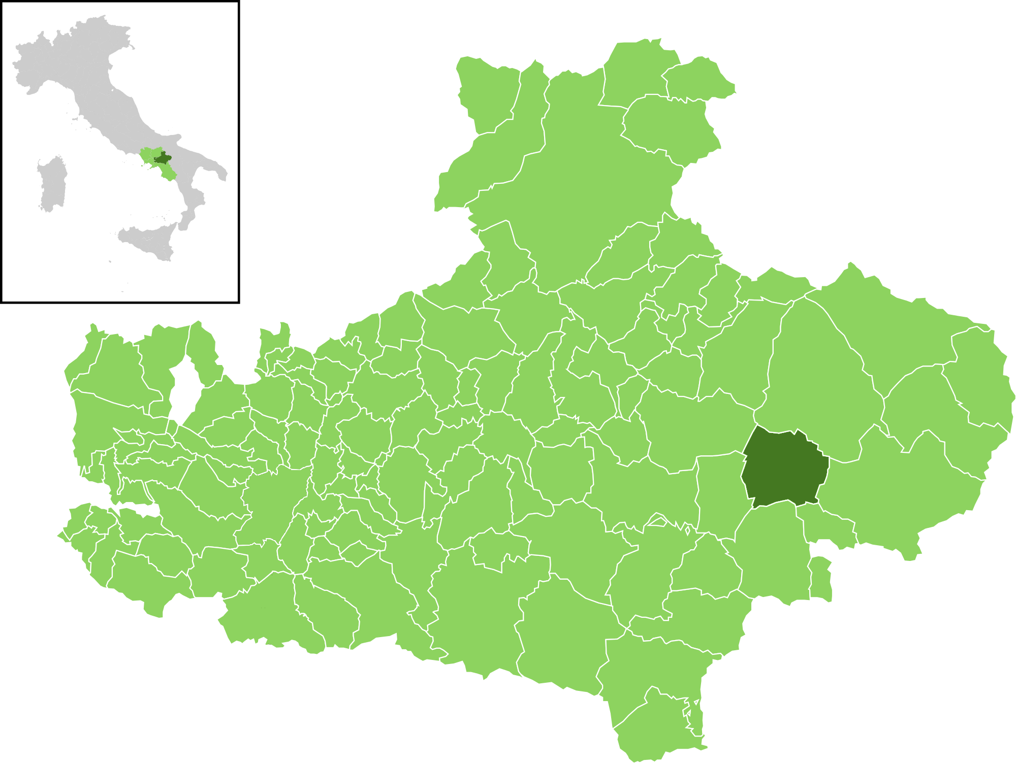 Il comune all'interno della provincia di Avellino